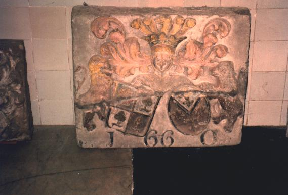 Wapenstien út 1660 wêrop de kombinearre famyljewapens fan de famyljes Hoytema en Ockema te sjen binne. De tekening komt út it Printekammenet fan it Frysk Museum yn Ljouwert.